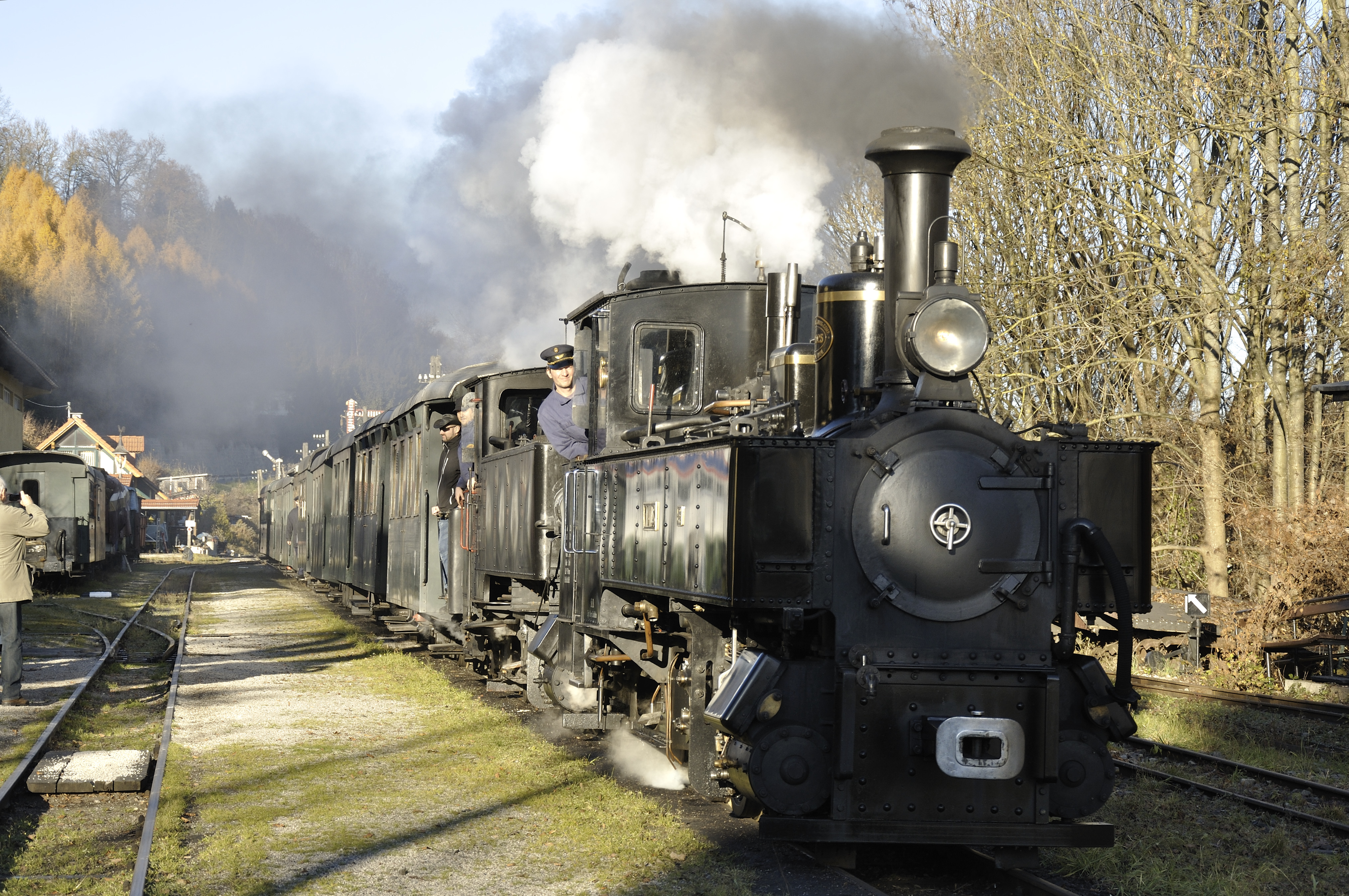 Bahnhof Grünburg Einfahrt der Lokomotive Nr.6 KLAUS